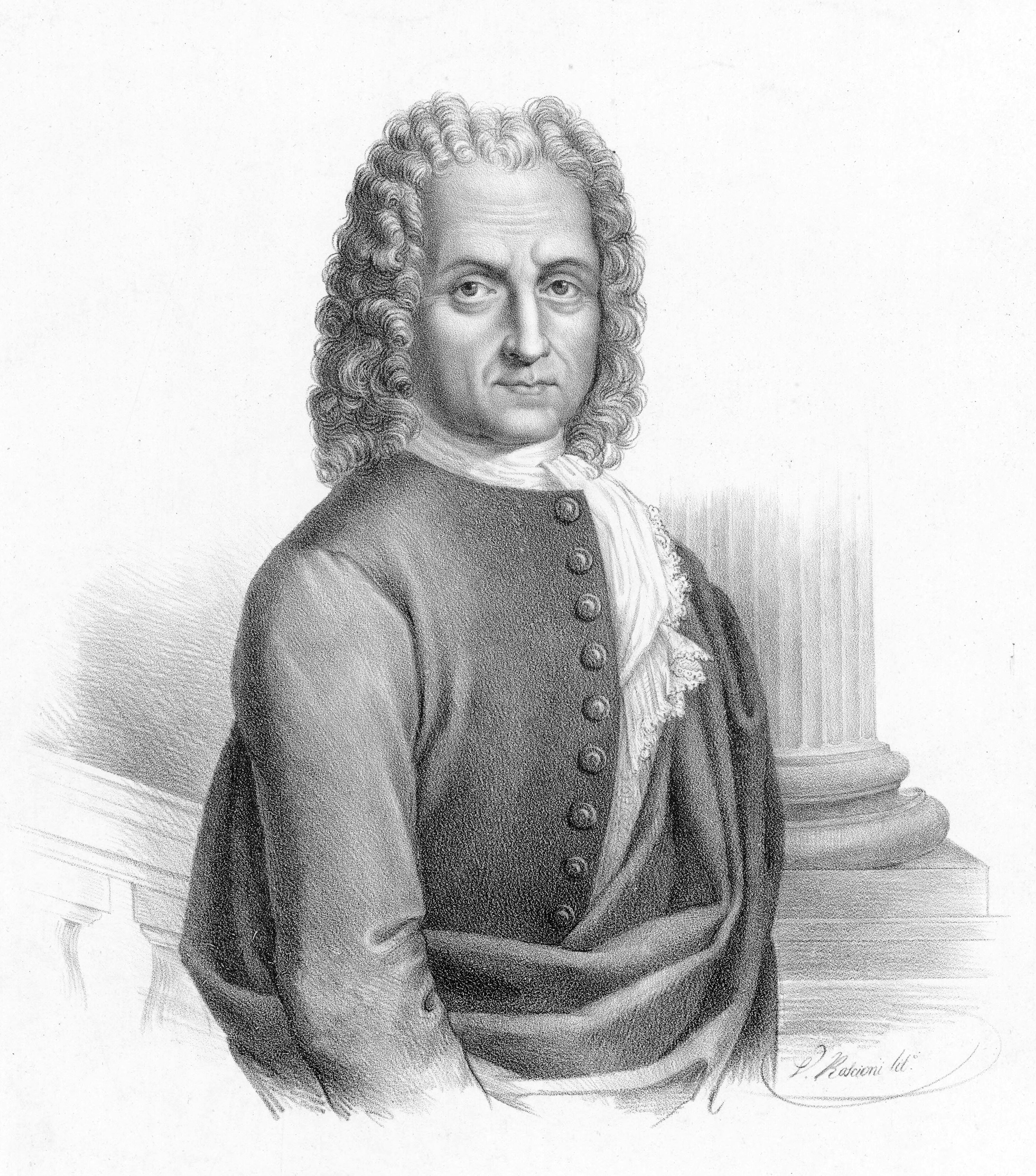 Depicted person: Benedetto Marcello